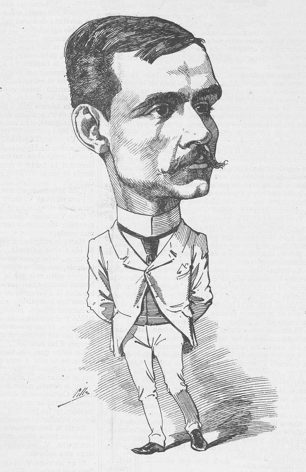 Lorenzo Leal.